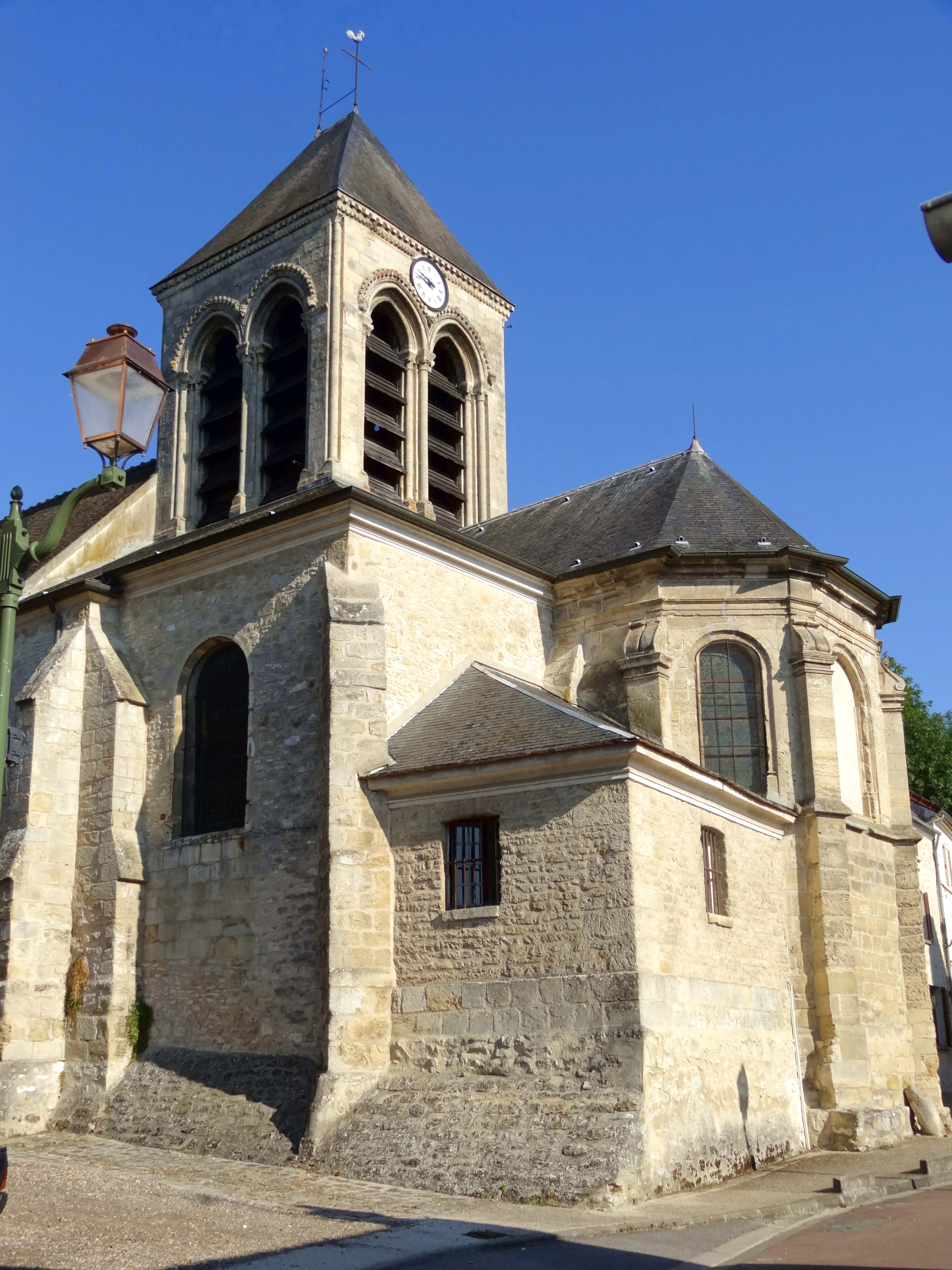 Église Saint-Séverin d'Oinville-sur-Montcient - voir titre.